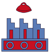 Escudo del municipio de Tlaquiltenango, Morelos.